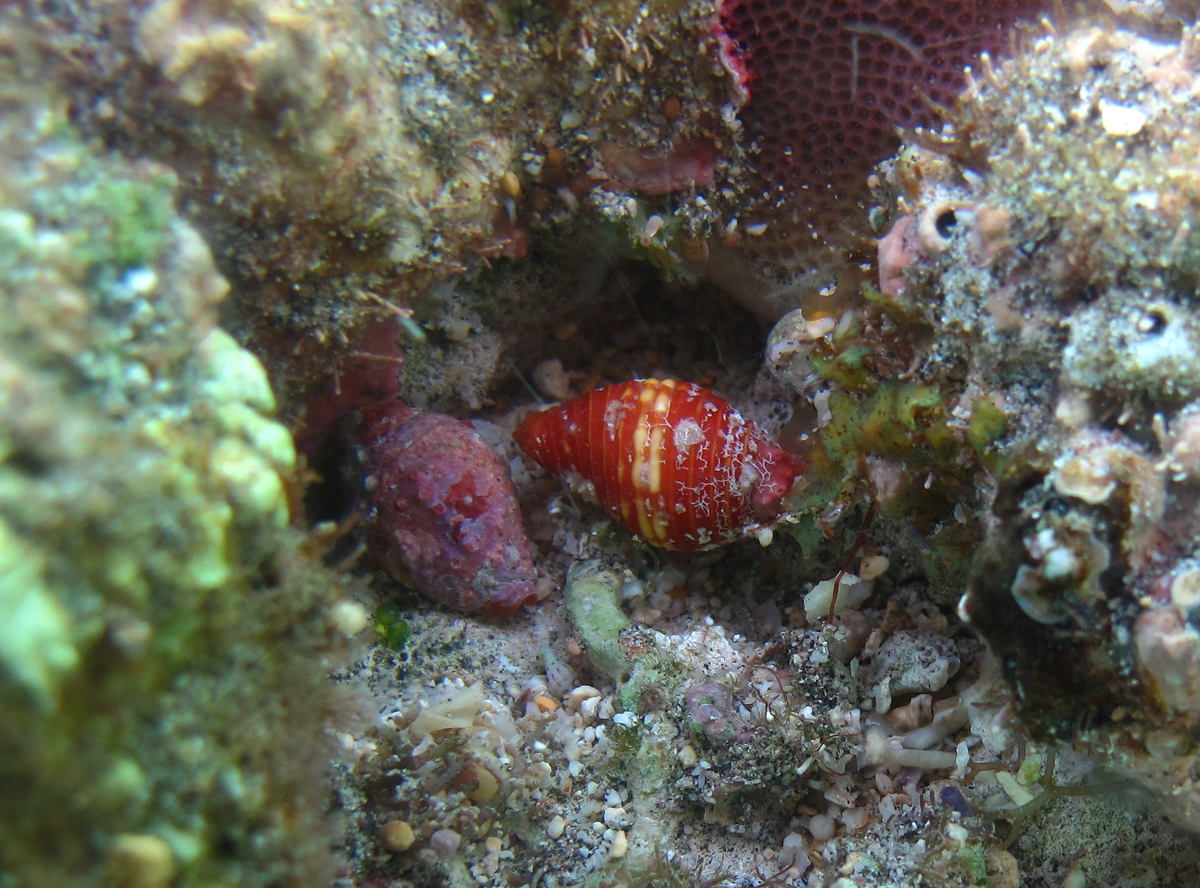 Une Pseudonebularia cucumerina (ex-Mitra cucumerina) à la Réunion.